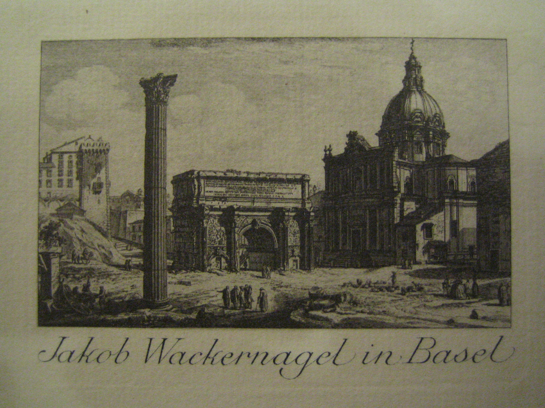 Ex Libris von Jakob Wackernagel aus dem Jahre 1897